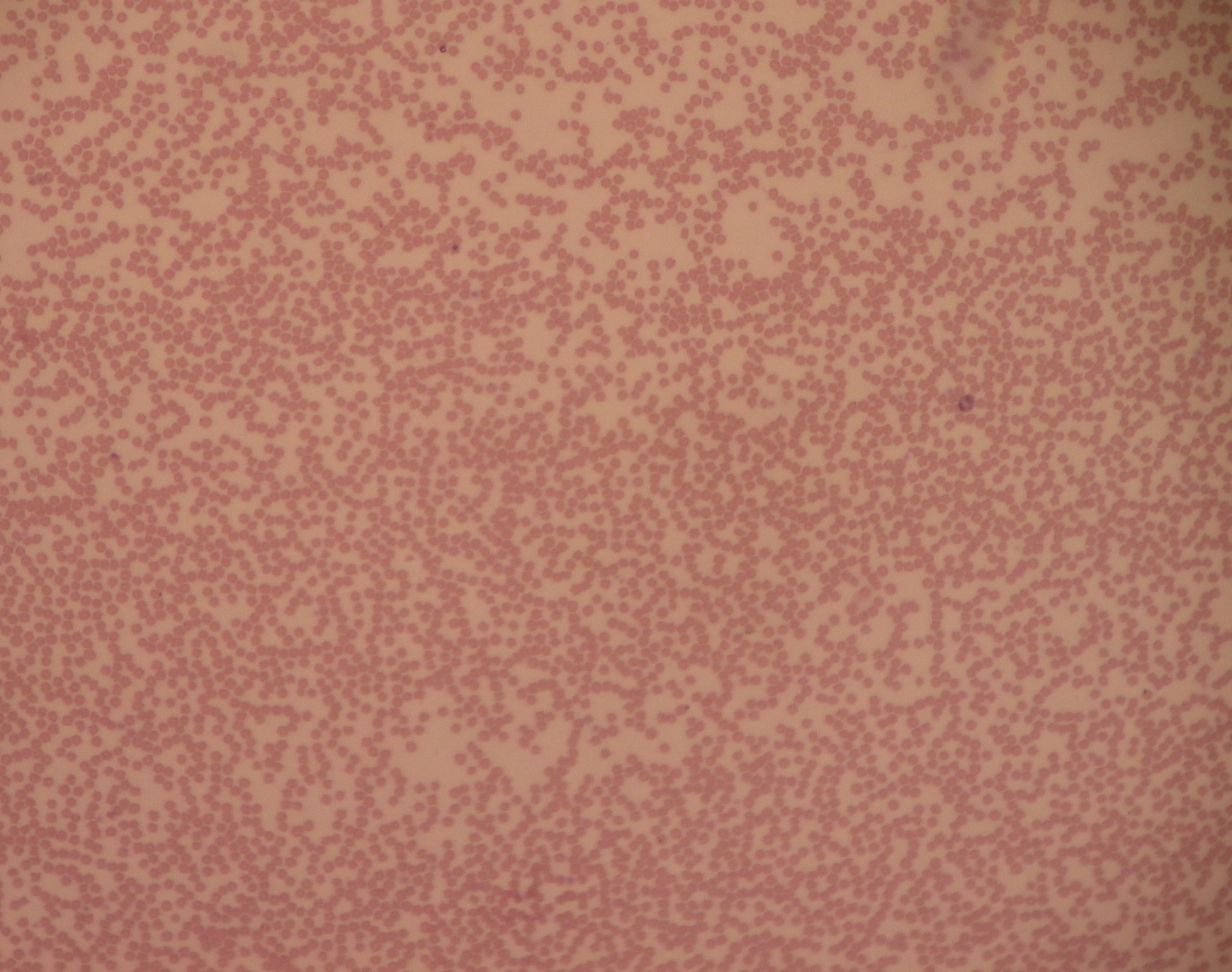 Foto de un campo 10x de un frote sanguíneo mostrando una neutropenia importante